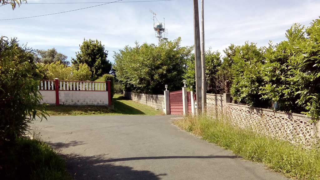 Vista do Calvario.